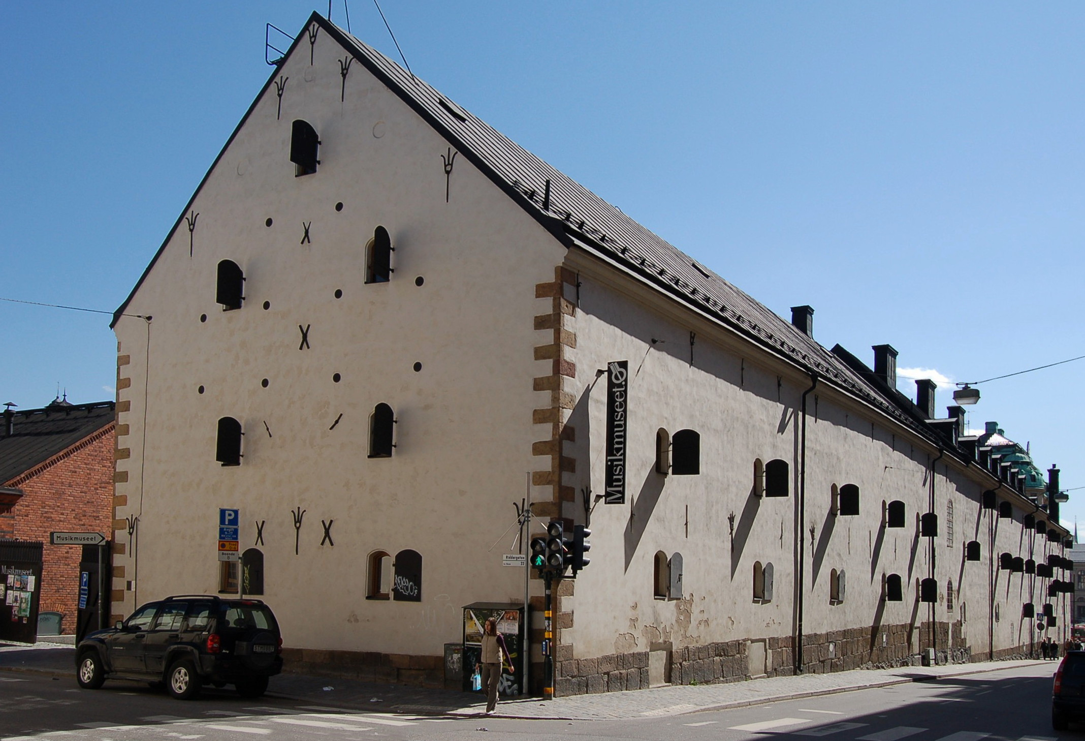 Kronobageriet i Stockholm, vy från korsningen Sibyllegatan/Riddargatan. Eldsta delen från 1600-talet; påbyggnad 1720. Ombyggnad till museum 1978; arkitekt Kjell Abramson.